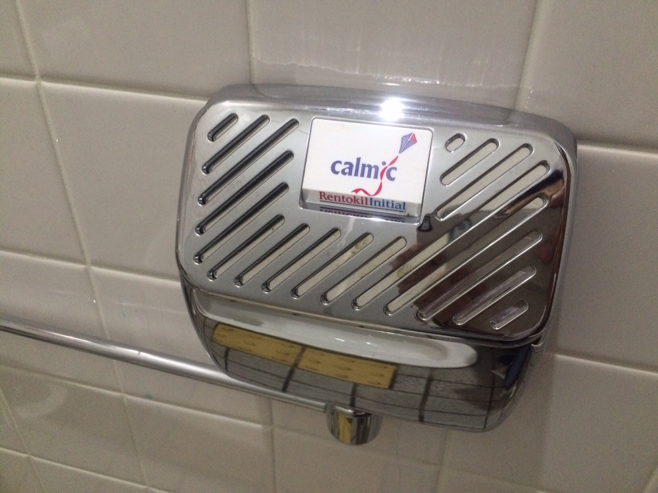 Calmic MK7